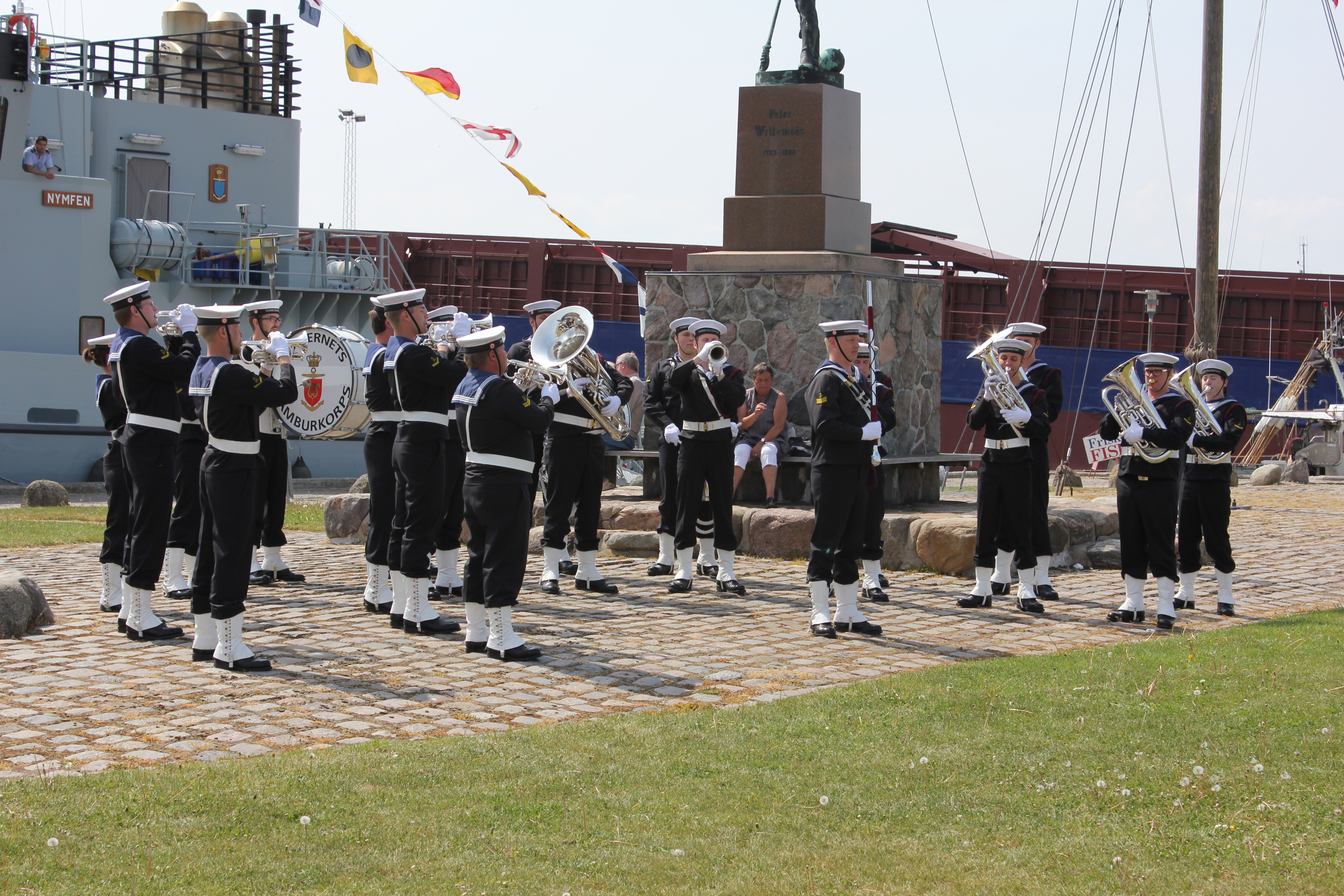 Søværnets Tamburkorps under koncert foran patruljefartøjet NYMFEN, i anledning af NYMFENs adoption i Assens.